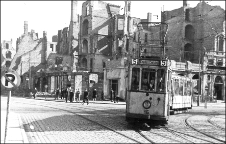 Aleja Wyzwolenia w 1948 r. (Szczecin). Ze zbiorów Tadeusza Strzelczyka